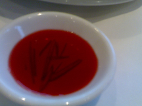 Cantonese cuisine red vinegar